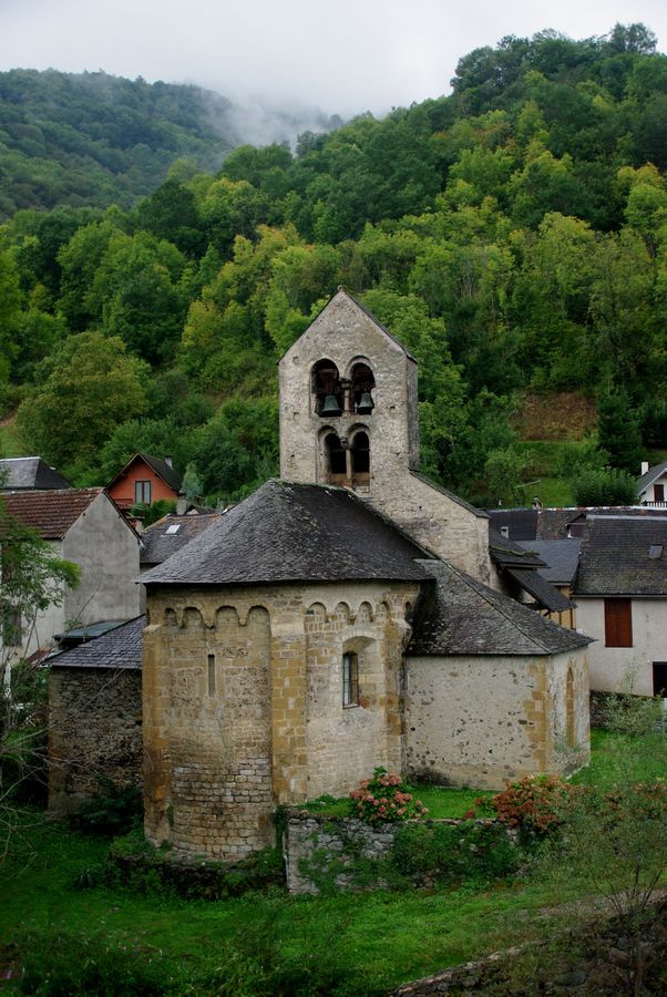 Église Notre-Dame d'Ourjout. Deux chapelles formant transept ont été ajoutées au 18e siècle. Extérieurement, l'abside porte une corniche à modillons au-dessus d'arcatures sur corbelets sculptés. .